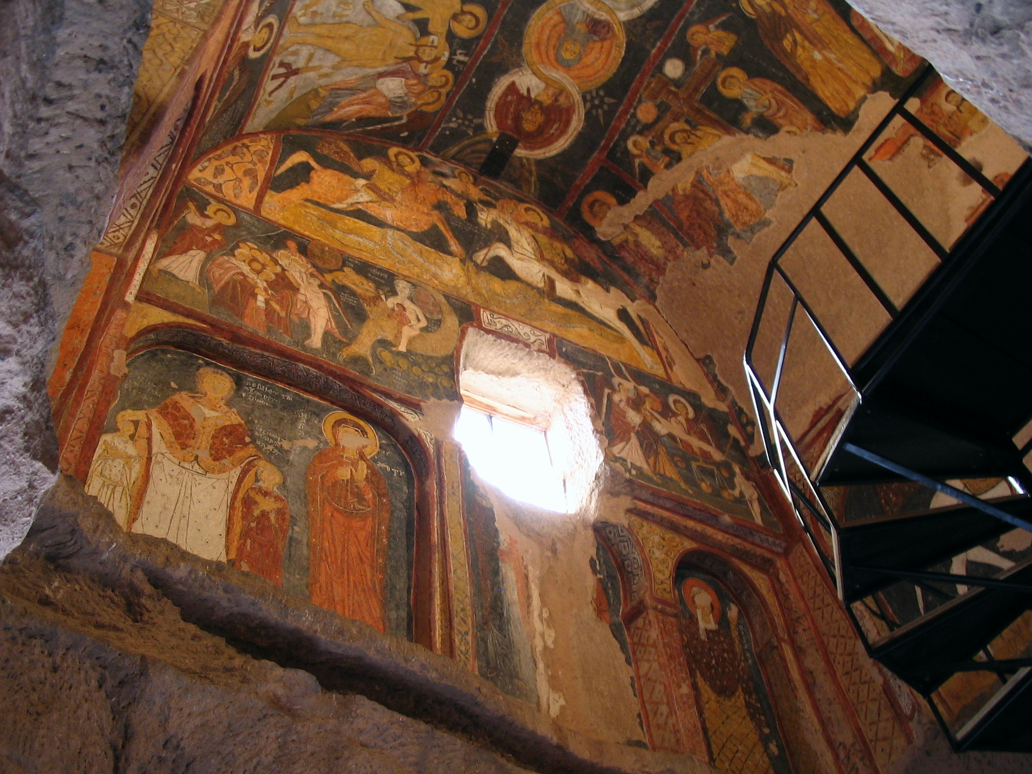 Fresken in der Johanneskirche in Gülşehir, Kappadokien, Zentraltürkei